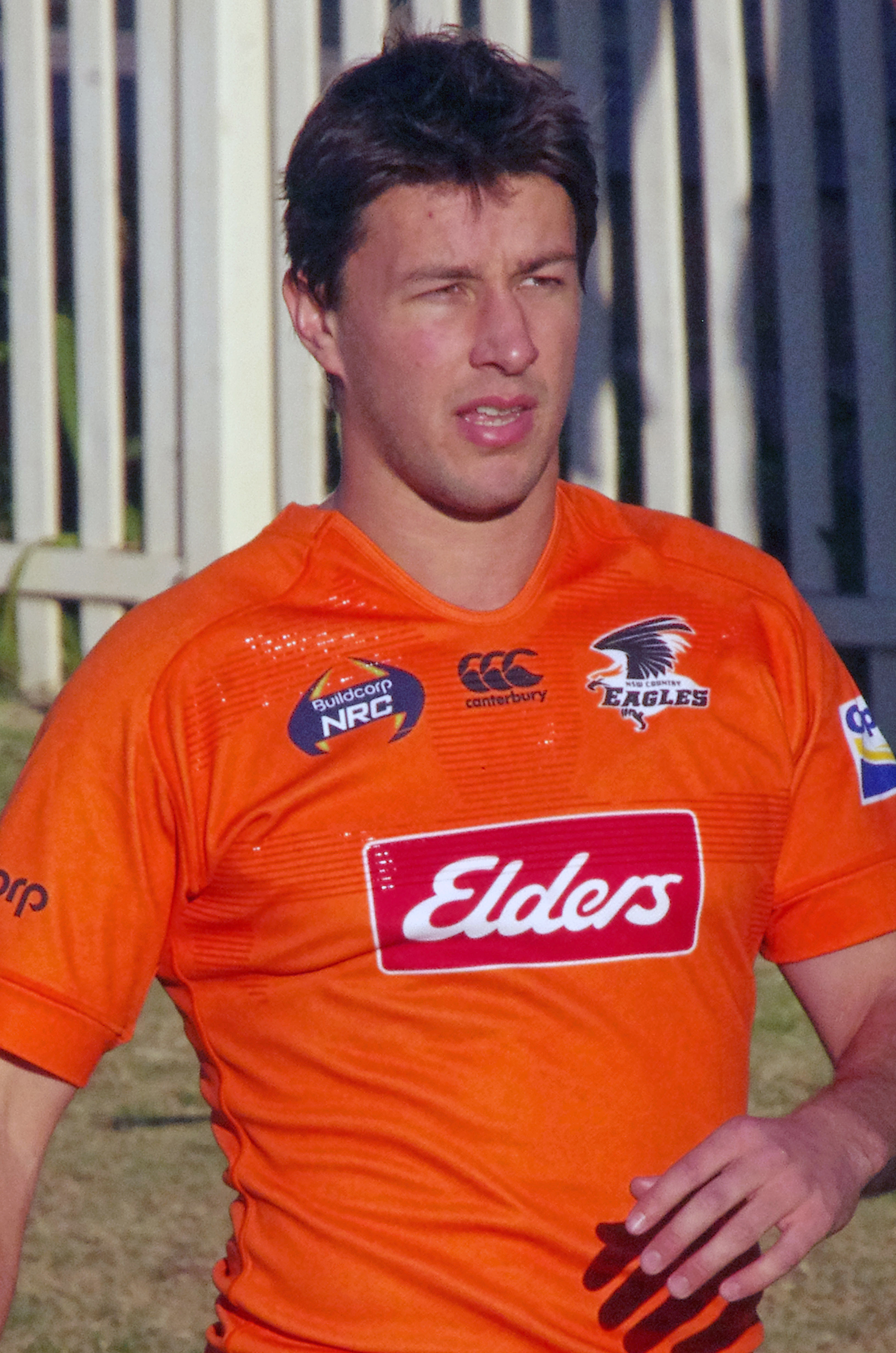 ANGUS ROBERTS